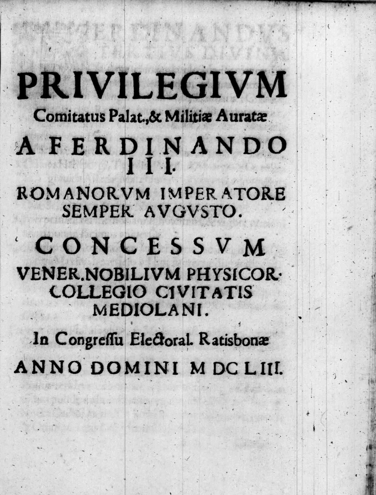 Frontespizio